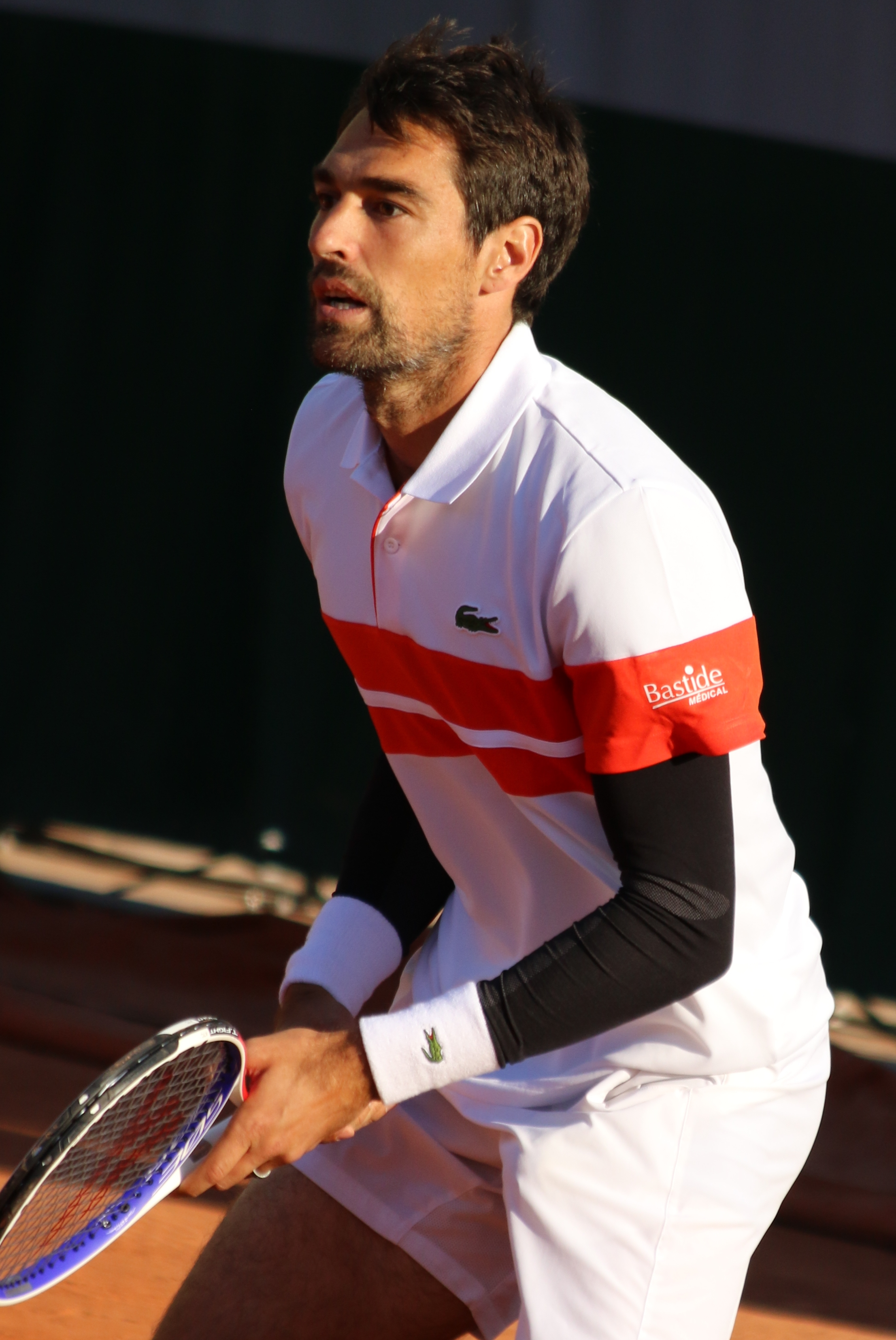 Chardy RG19 (16)